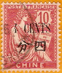 Emission générale des bureaux français en Chine, émission de 1907, utilisé à Shangai